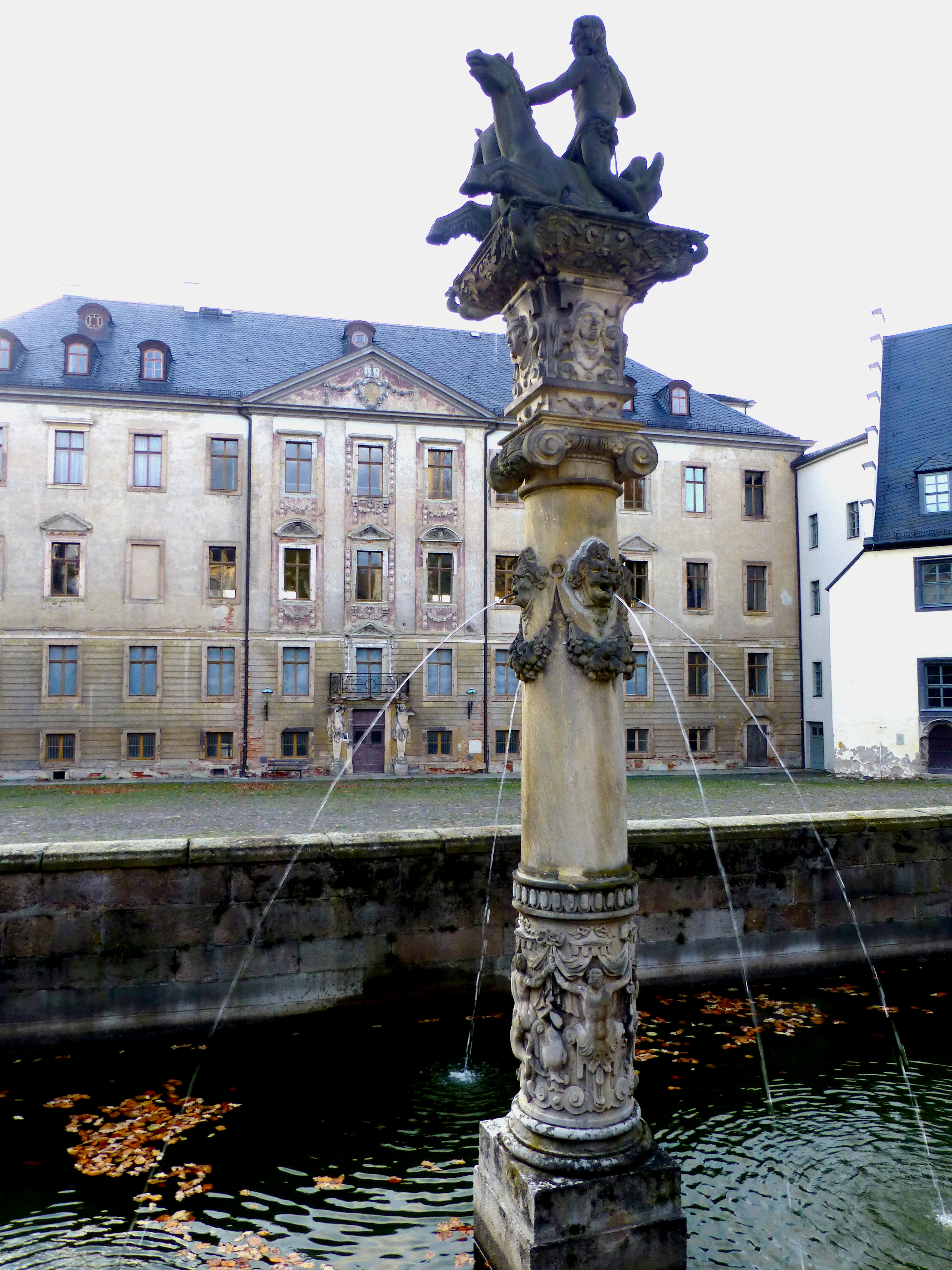 Pferdeschwemme im Schloss Altenburg mit Neptunbrunnen